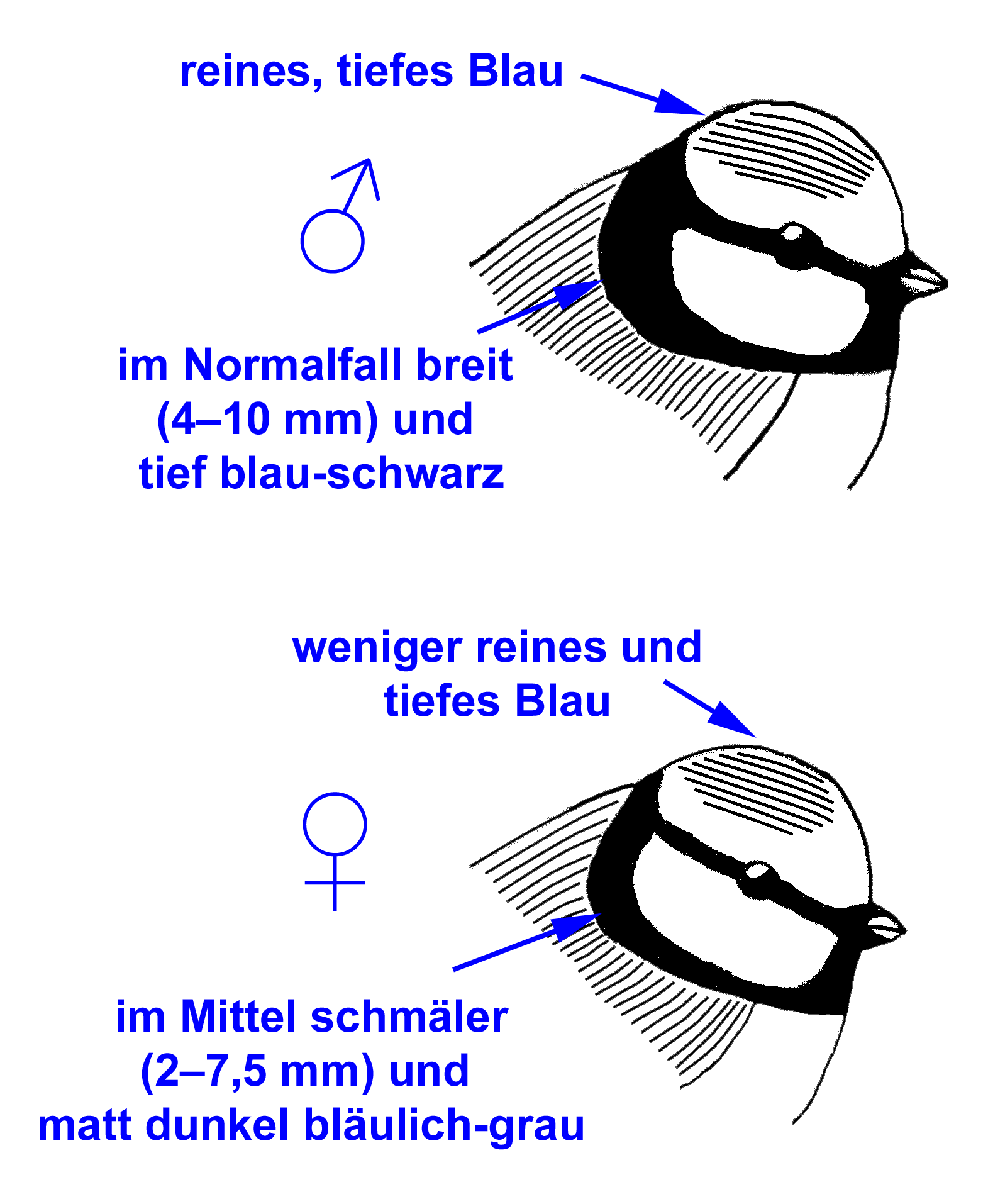 Sex differences of Paraus caeruleus (Blue tit). Adapted from: Manfred Föger, Karin Pegoraro: Die Blaumeise. Neue Brehm Bücherei, Hohenwarleben 2004, ISBN 3-89432-862-2